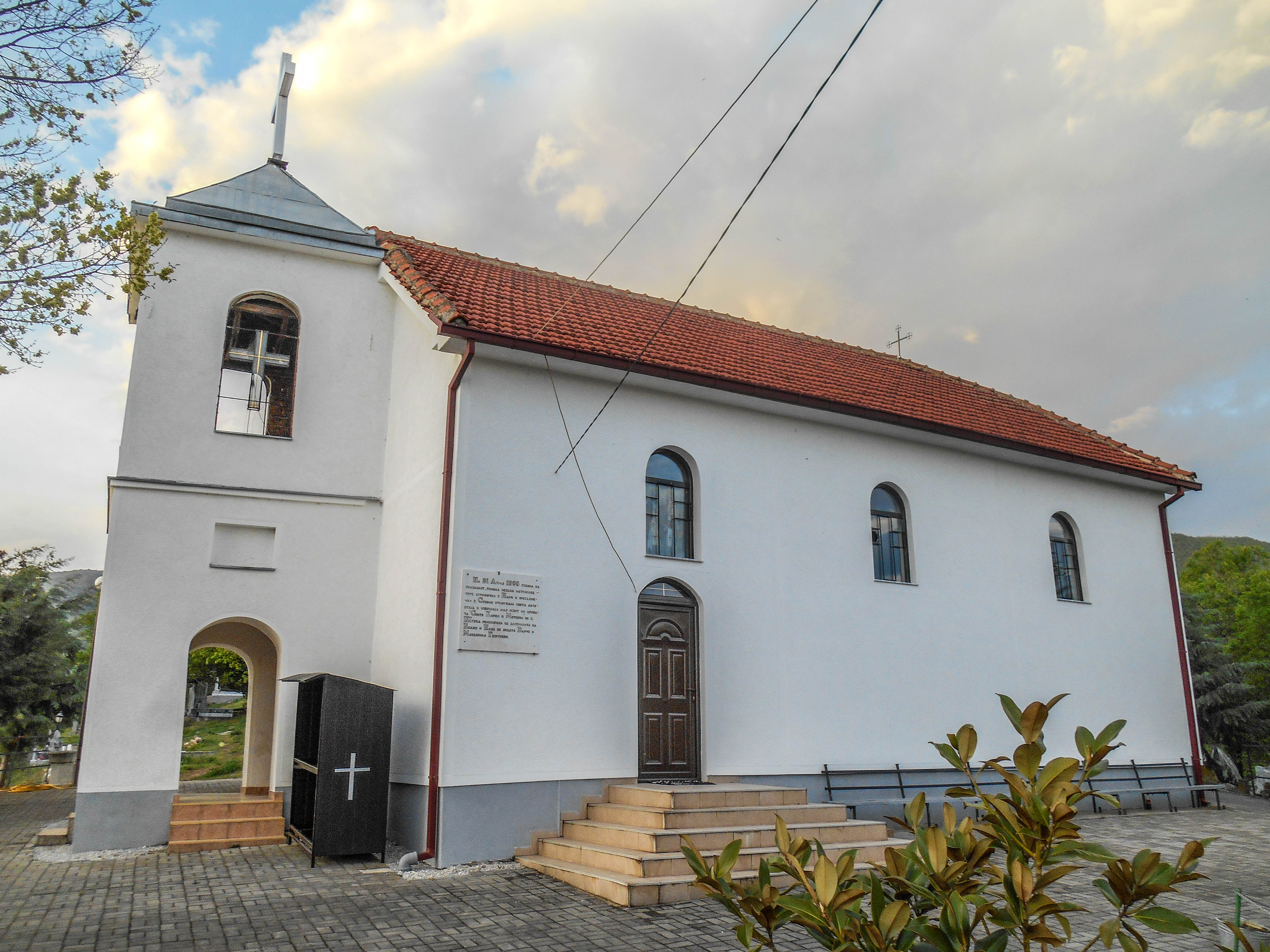 Црква „Св. Кирил и Методиј“ - Штука